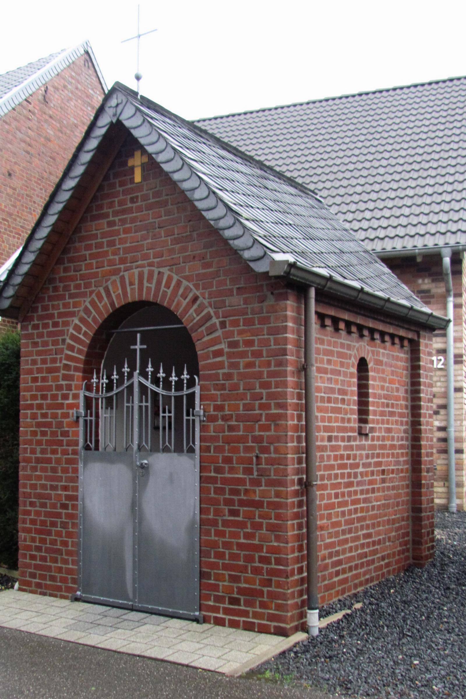 Kirchen, Kapellen in Heinsberg